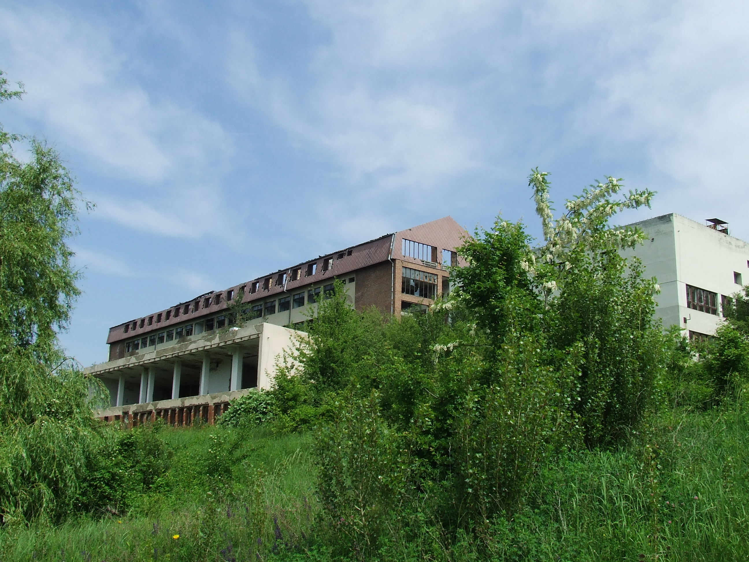 Elhagyott bányaépület Komló határában